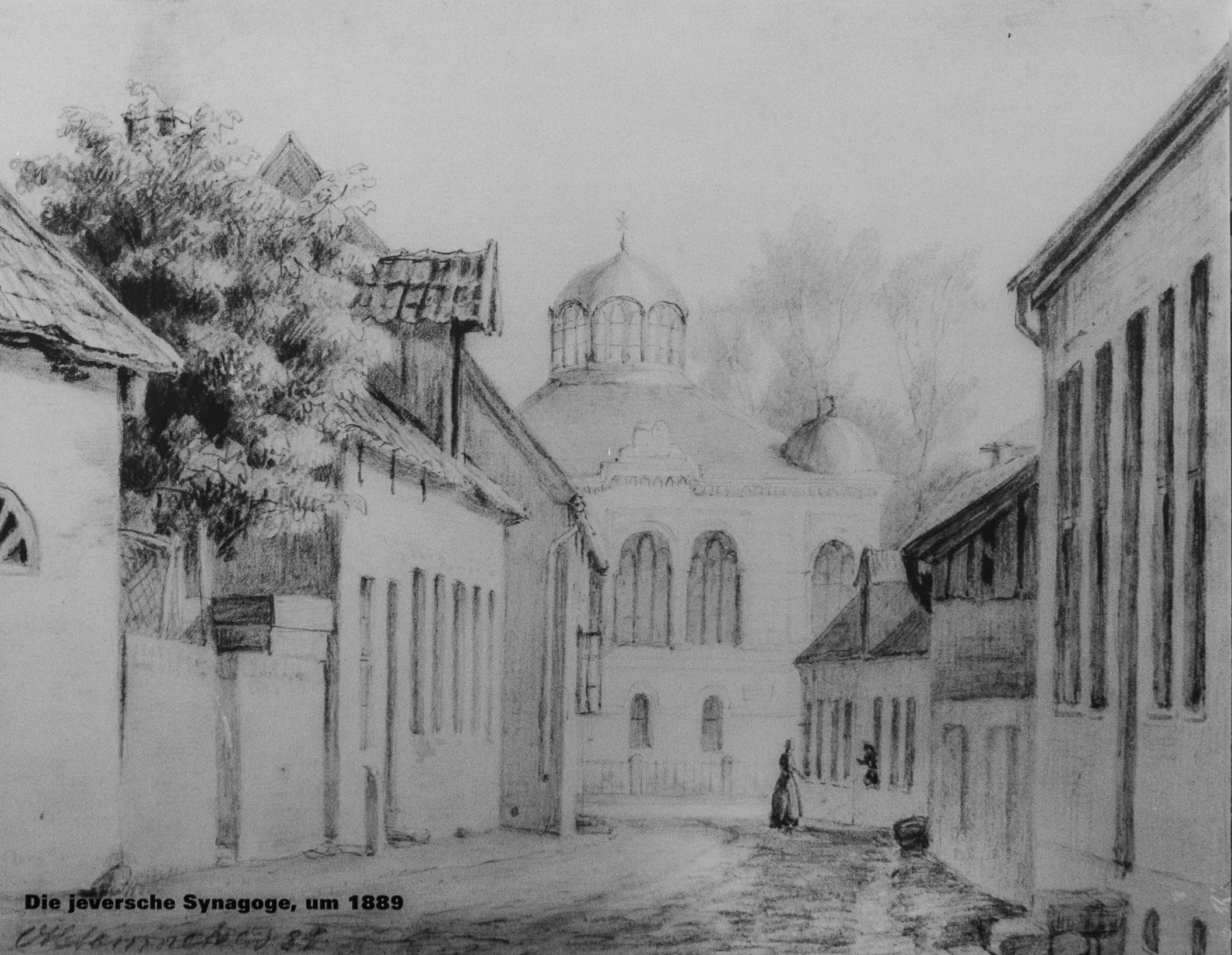 GröschlerHaus - Zentrum für Jüdische Geschichte und Zeitgeschichte der Region auf den Grundmauer der von örtlichen Nationalsozialisten zerstörten Synagoge von Jever